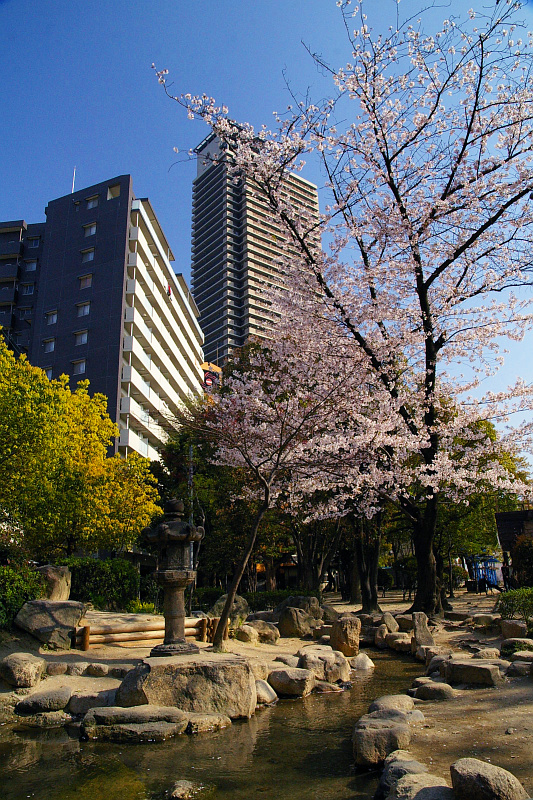 Fujian-Teien, Shimo-Fukushima Park at Osaka